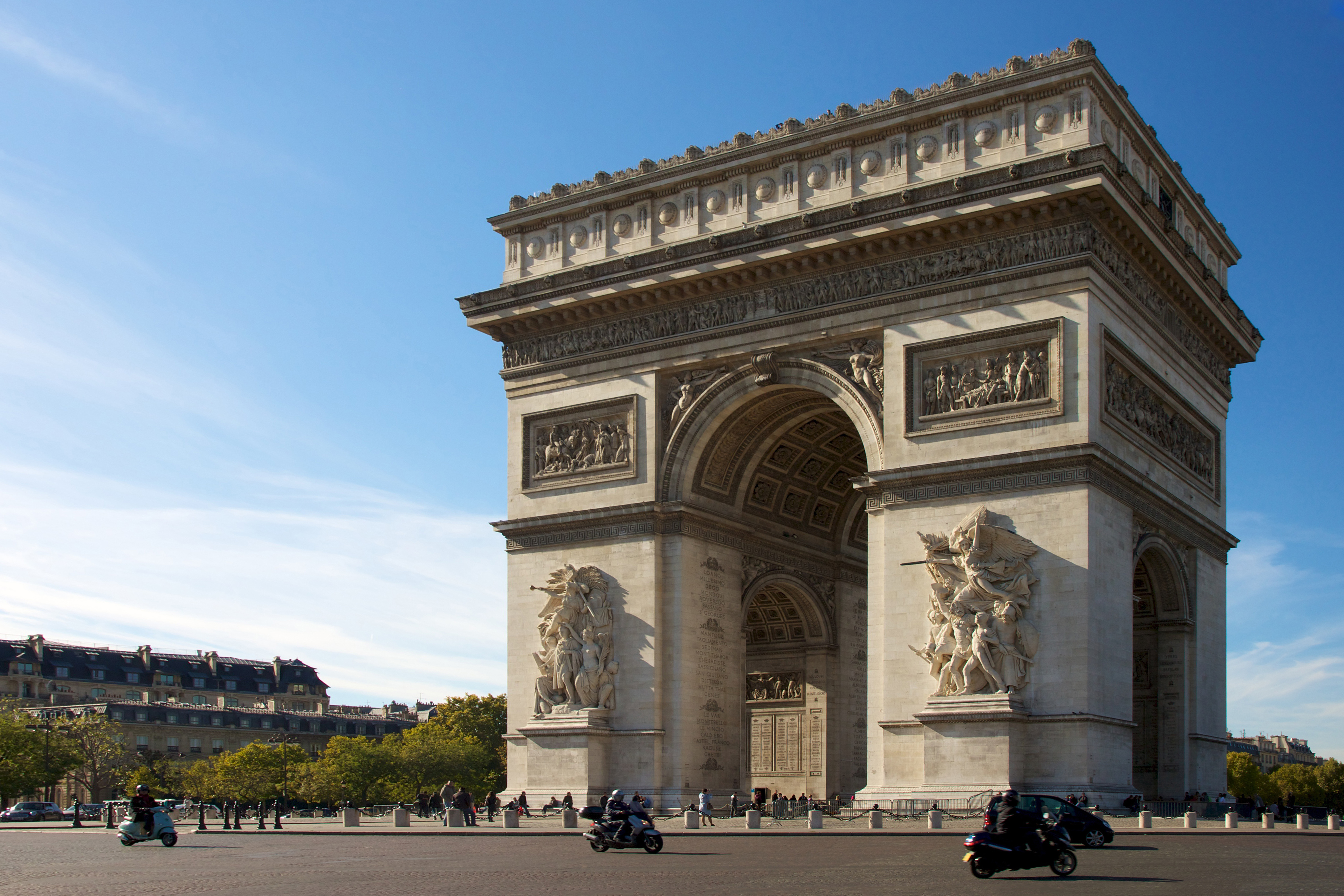 Arc de Triomphe, Paris, France.